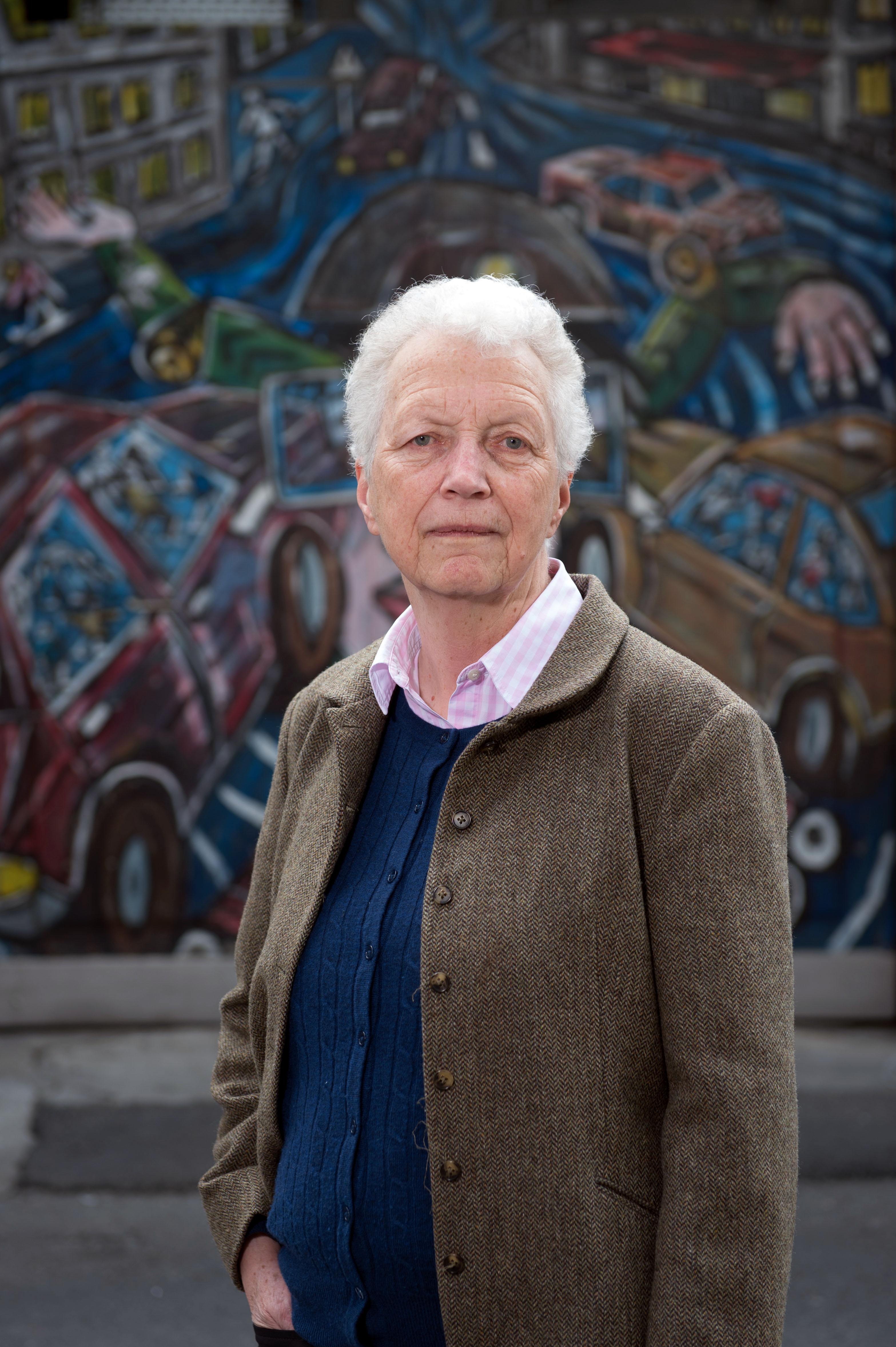 Doris Jakubec, Côtes-de-Montbenon à Lausanne, en 2014